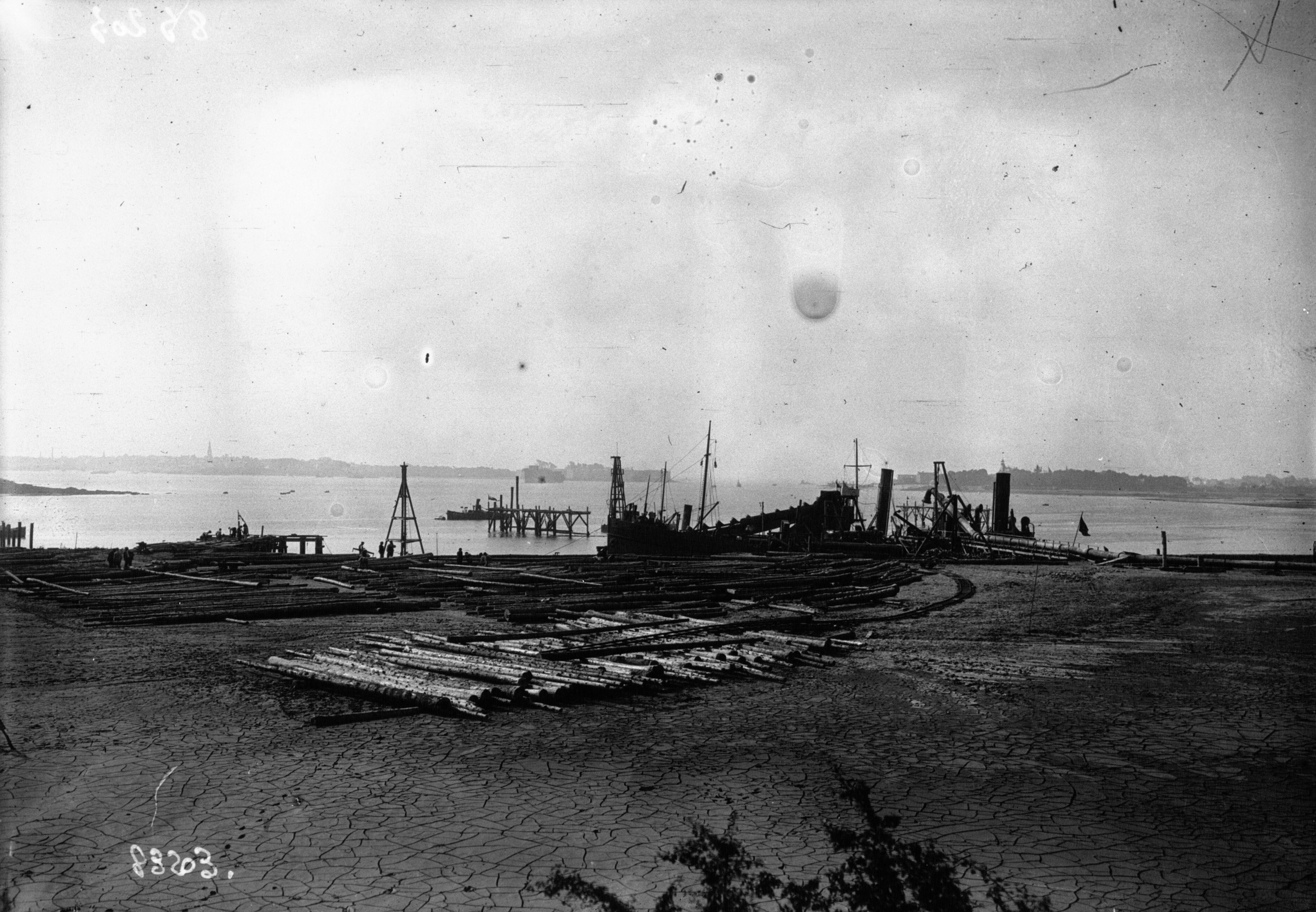 Travaux du port de pêche de Keroman à Lorient au début des années 1920